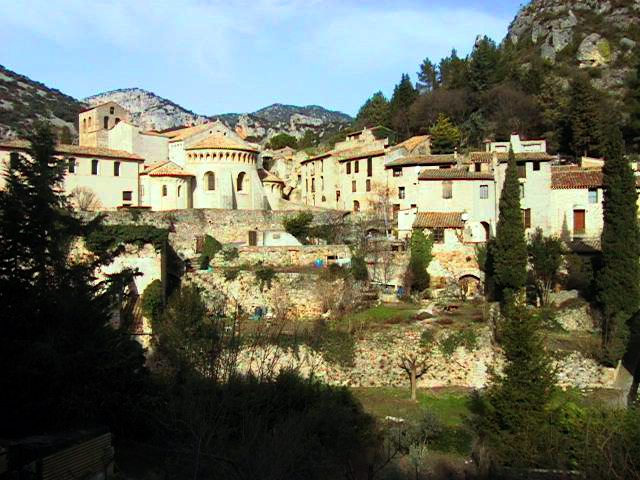 Saint-Guilhem-le-Désert, Hérault, France